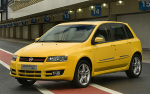 Foto tirada na apresentação do veículo (Fiat Stilo) no autódromo de São Paulo, SP, Brasil.